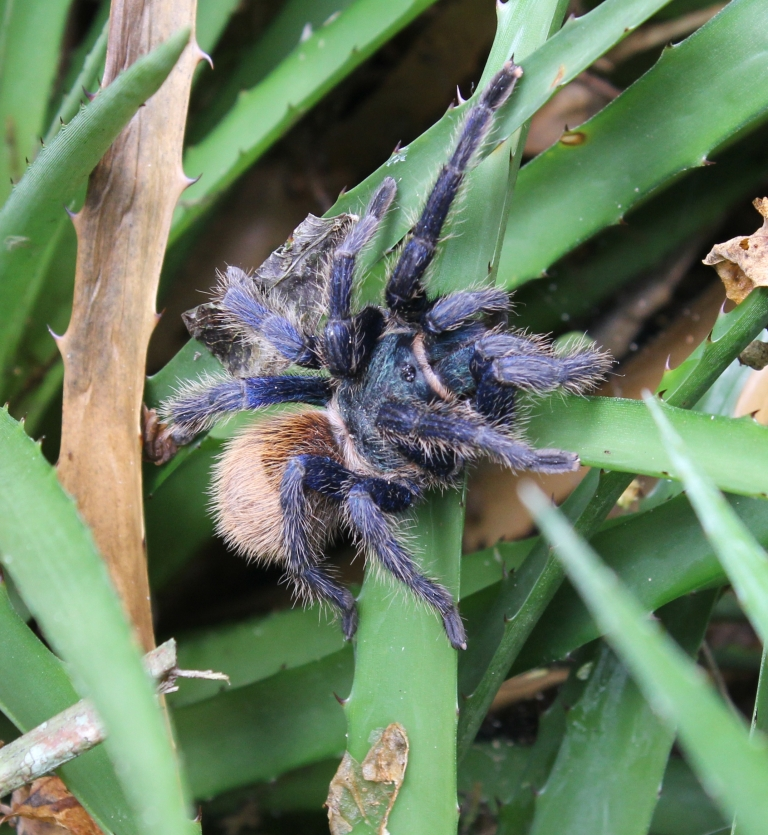 Tarántula Patas Azules